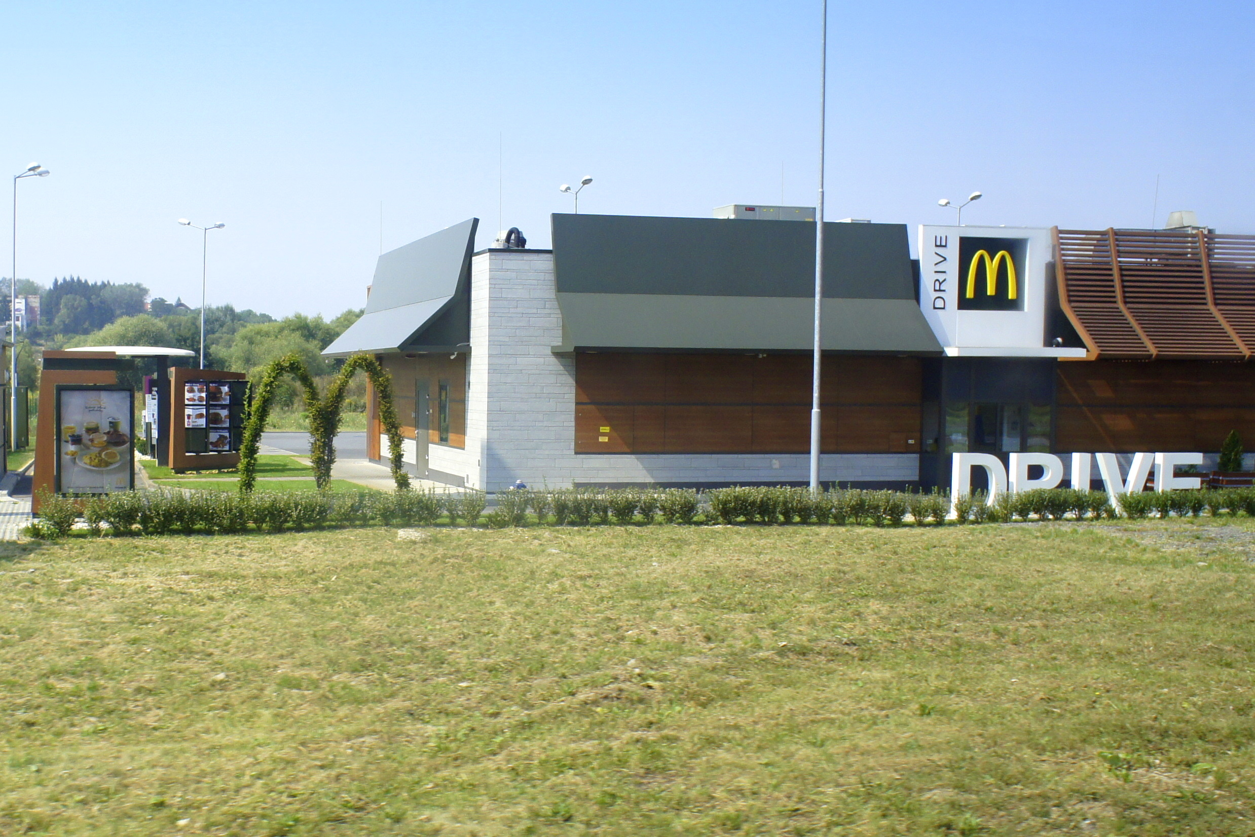 Zieleń formowana w kształcie "złotych łuków" przed McDonaldem w Koszycach na Słowacji